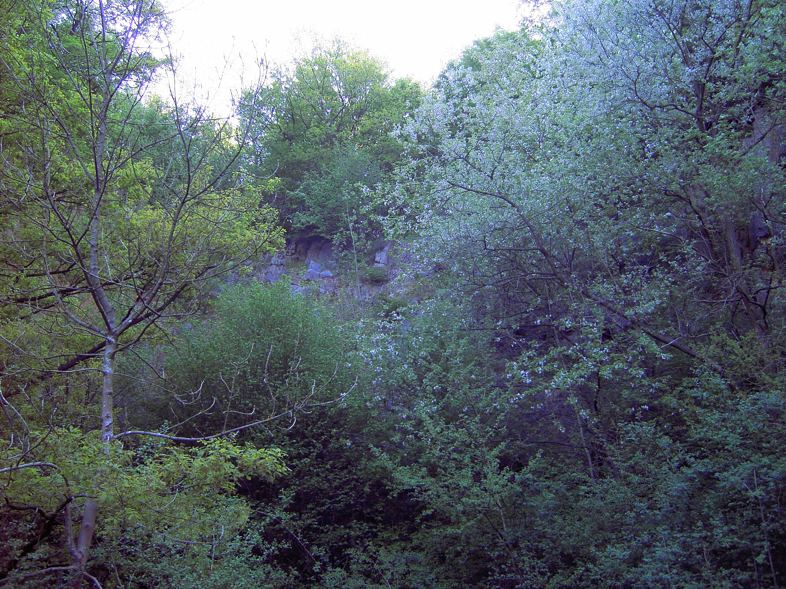 Blick auf eine inzwischen bewachsene Wand des Steinbruchs im Schomet